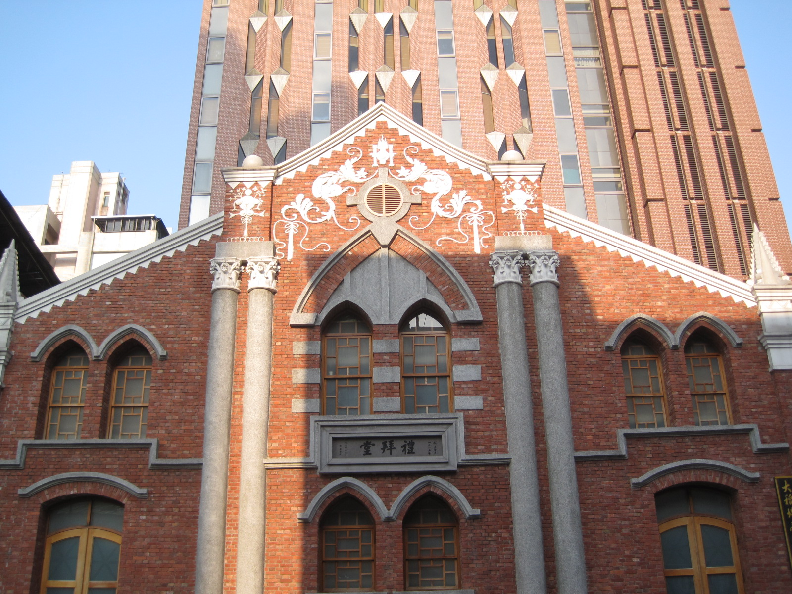 臺灣基督長老教會大稻埕教會